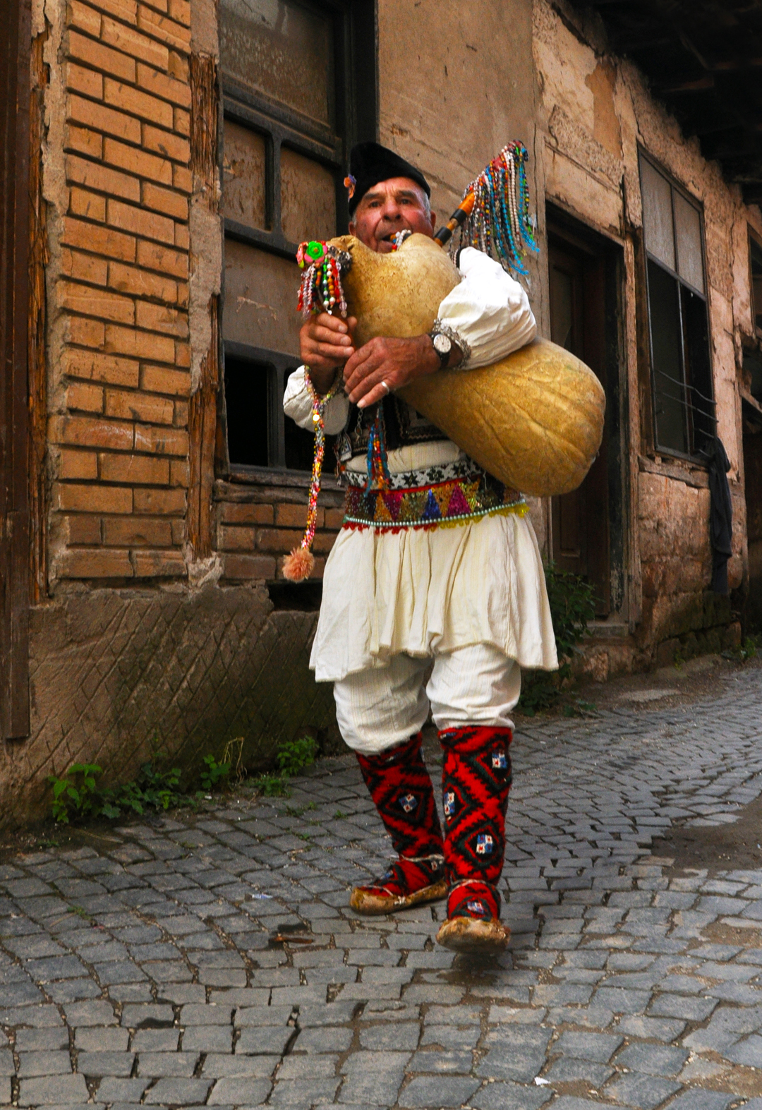 Гајдарџија